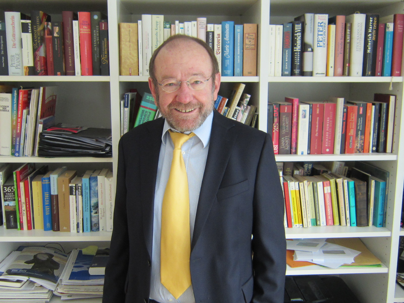 Lothar Schäffner (1943 in Rottweil a.N. geboren und in Stuttgart aufgewachsen) ist ein deutscher Universitätsprofessor, dessen Berufsbiographie sich durch das ständige Bemühen, Theorie und Praxis miteinander zu verbinden, auszeichnet.